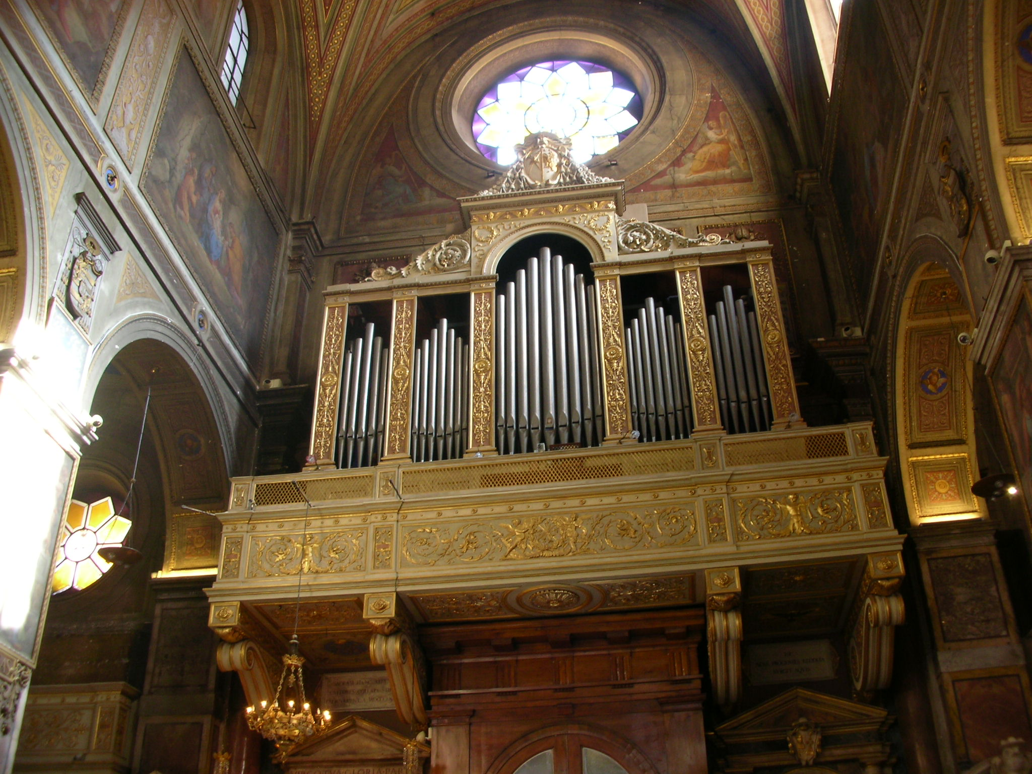 Organ, Sant'Agostino, Rome